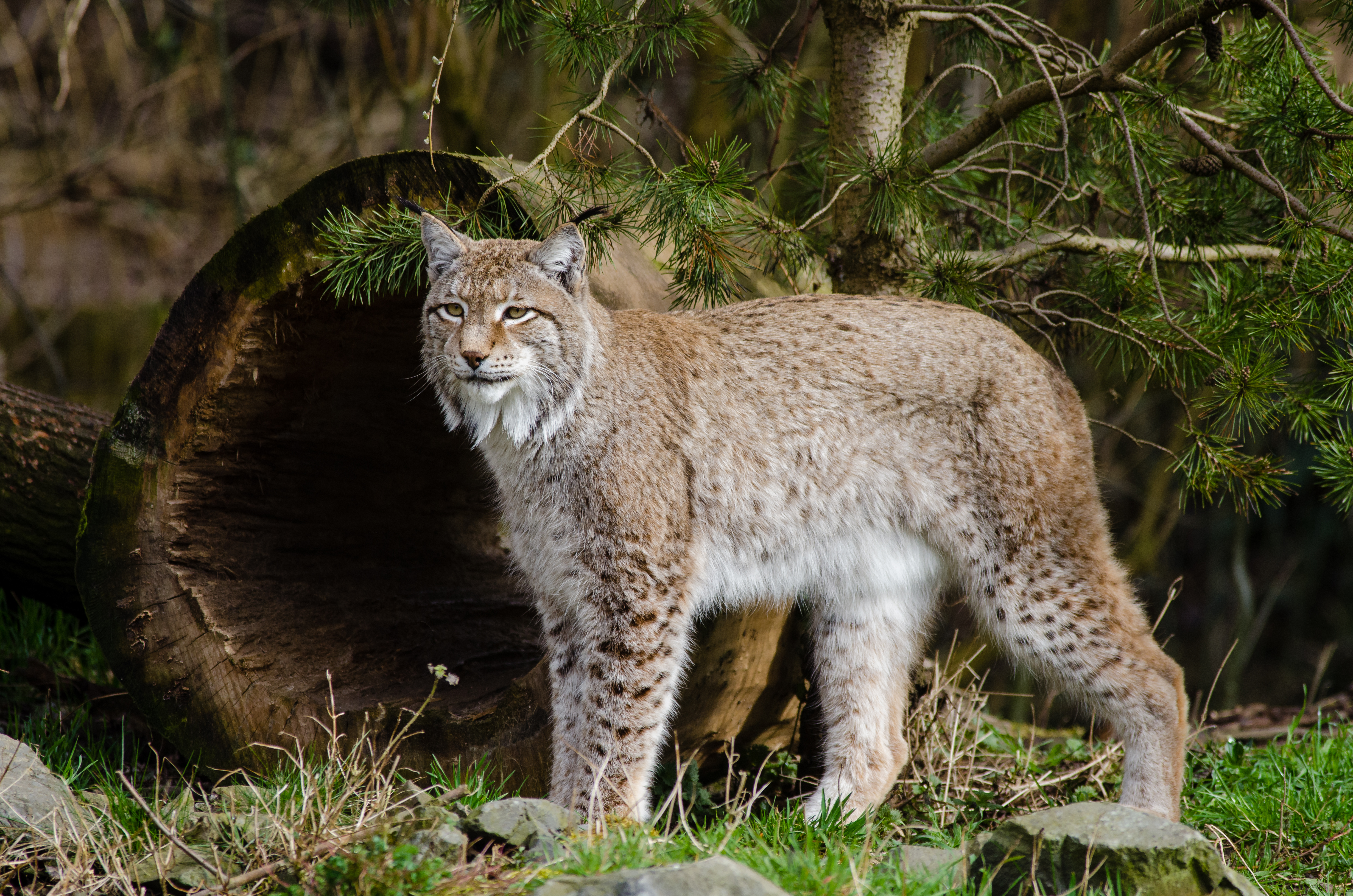 Lynx